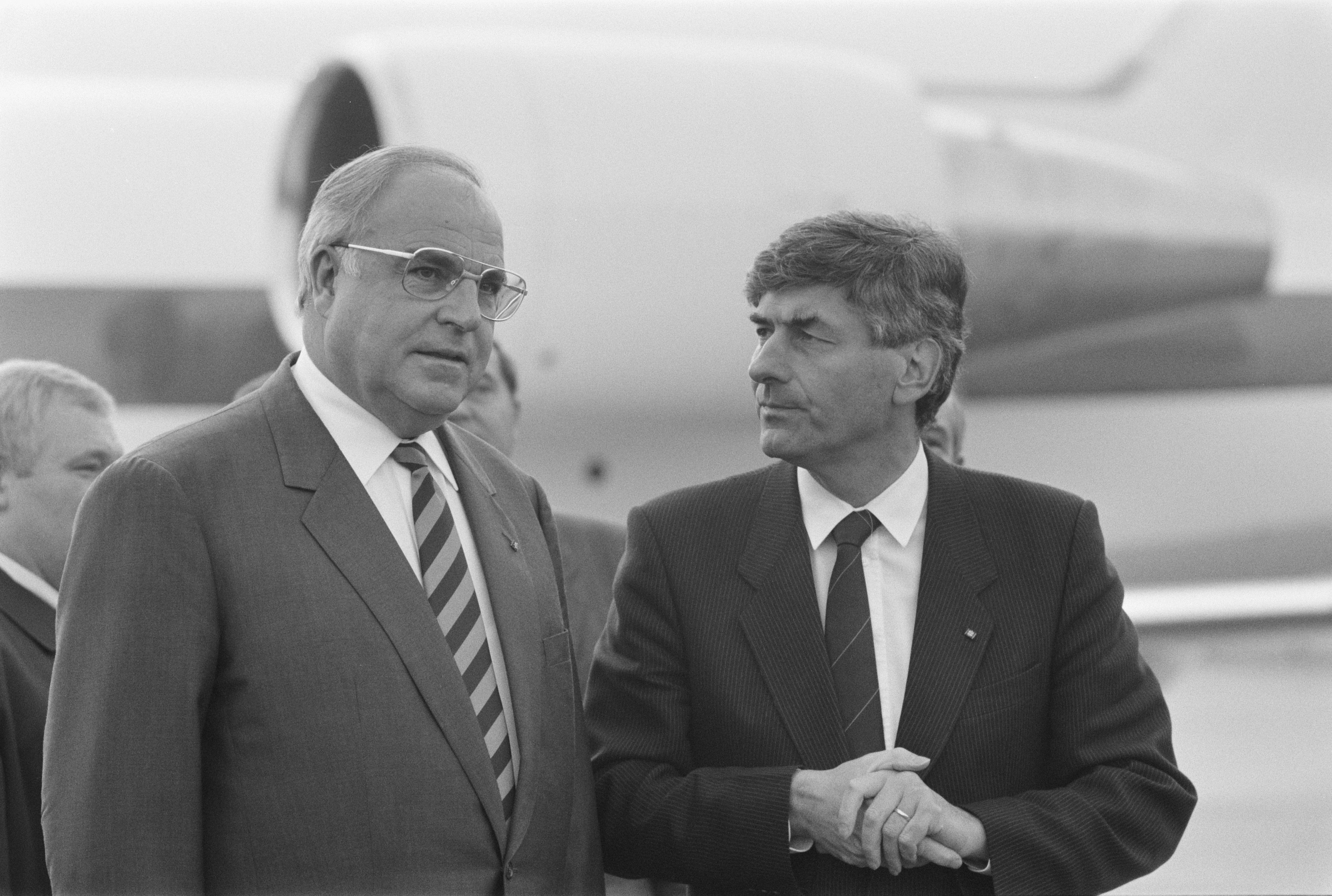 Collectie / Archief : Fotocollectie Anefo Reportage / Serie : [ onbekend ] Beschrijving : Bezoek bondskanselier Helmut Kohl ; Helmut Kohl en premier Lubbers op vliegveld Valkenburg (aankomst) Datum : 30 november 1987 Trefwoorden : aankomsten, bezoeken, vliegvelden Persoonsnaam : Helmut Kohl, Lubbers, Ruud Fotograaf : Croes, Rob C. / Anefo Auteursrechthebbende : Nationaal Archief Materiaalsoort : Negatief (zwart/wit) Nummer archiefinventaris : bekijk toegang 2.24.01.05 Bestanddeelnummer : 934-1404